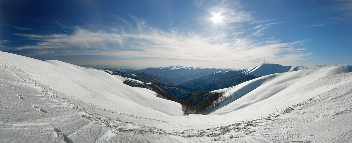 Карпатський біосферний заповідник, Рахівський, Тячівський, Хустський, Виноградівський райони